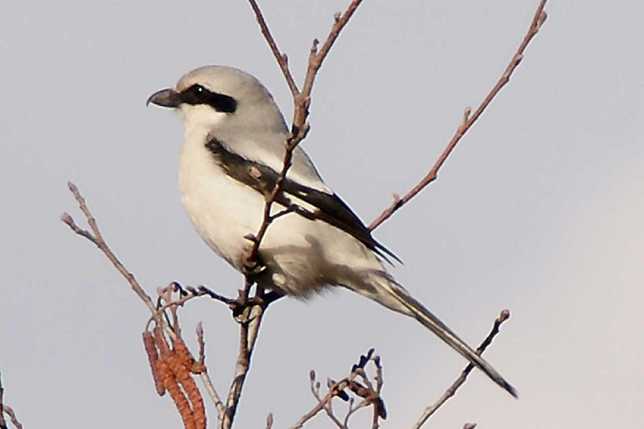 Ptak, dzierzba srokosz